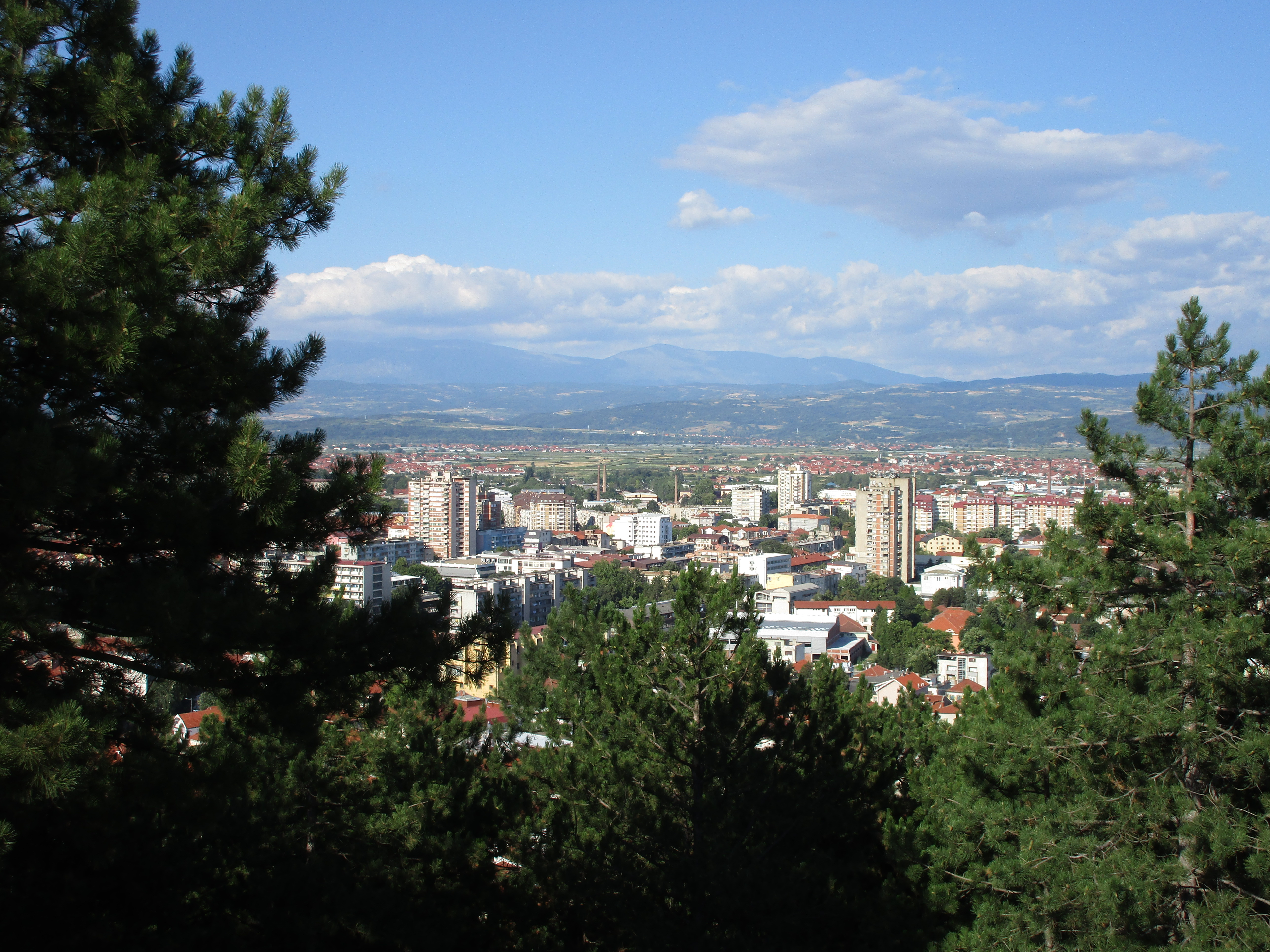 Srpski (latinica): Brdo Hisar kod Leskovca